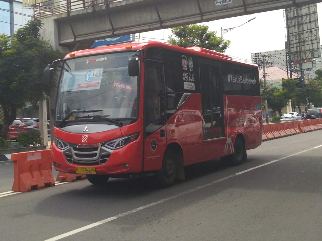 Koridor 4 - Touristo Trans Semarang Operated by PT Matra Semar